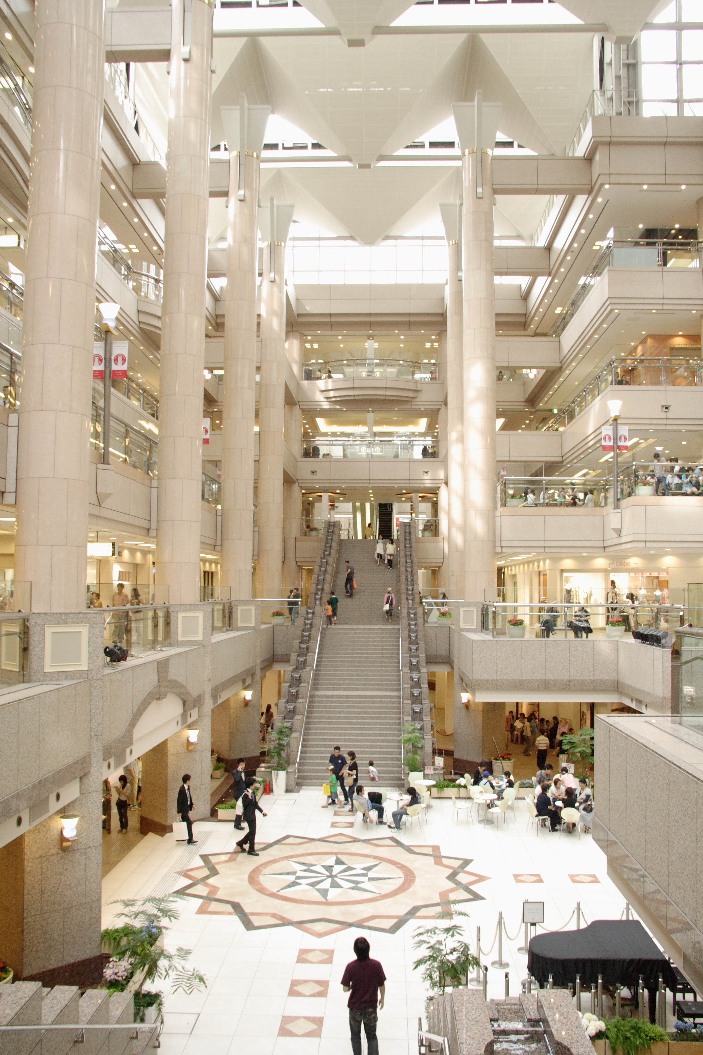 ランドマークプラザ, Landmark Plaza